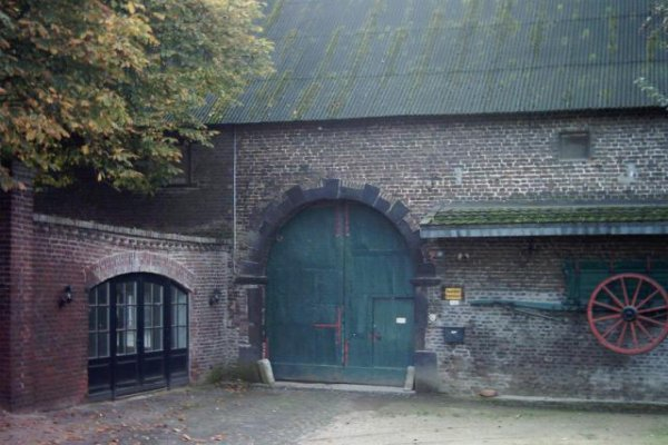 Denkmal Nr. 30 in Willich